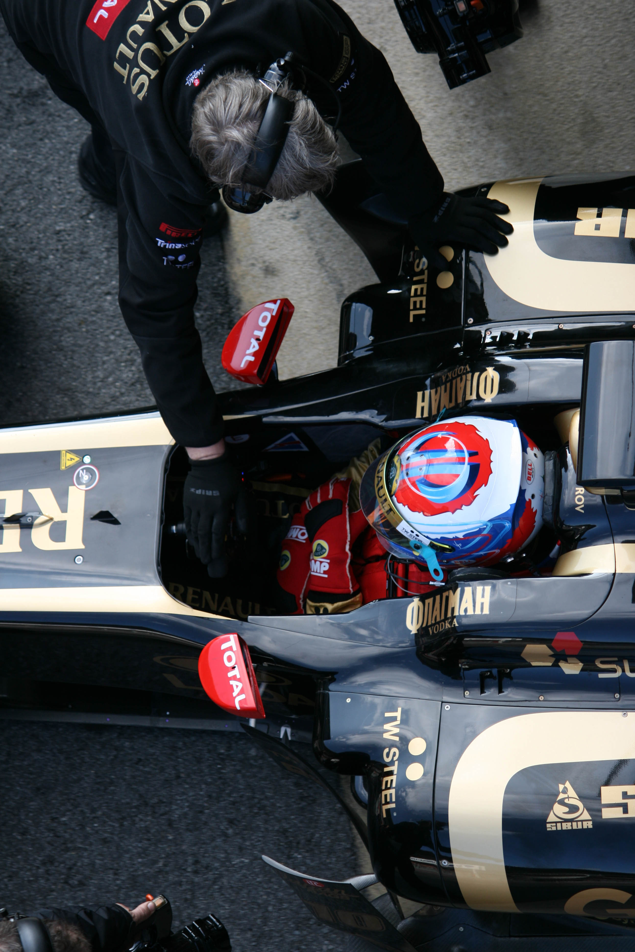 Petrov